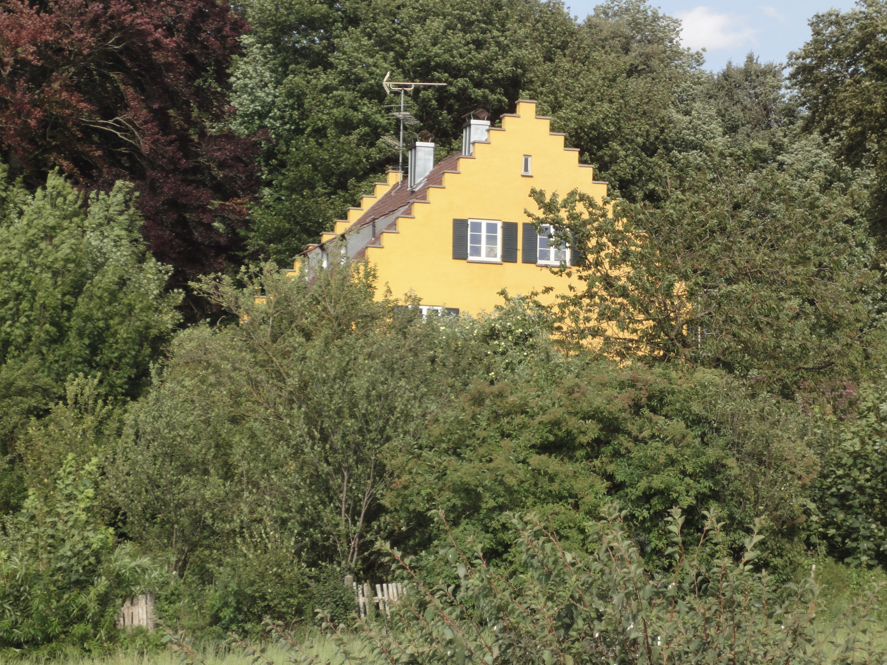 Ehem. Schloss Gailenbach in Gersthofen, zweigeschossiger Satteldachbau mit Treppengiebeln, vielleicht von Georg Hebel, im Kern 1592, 1816/17 umgebaut, 1955/56 erneuert; Schlossmauer; Park.